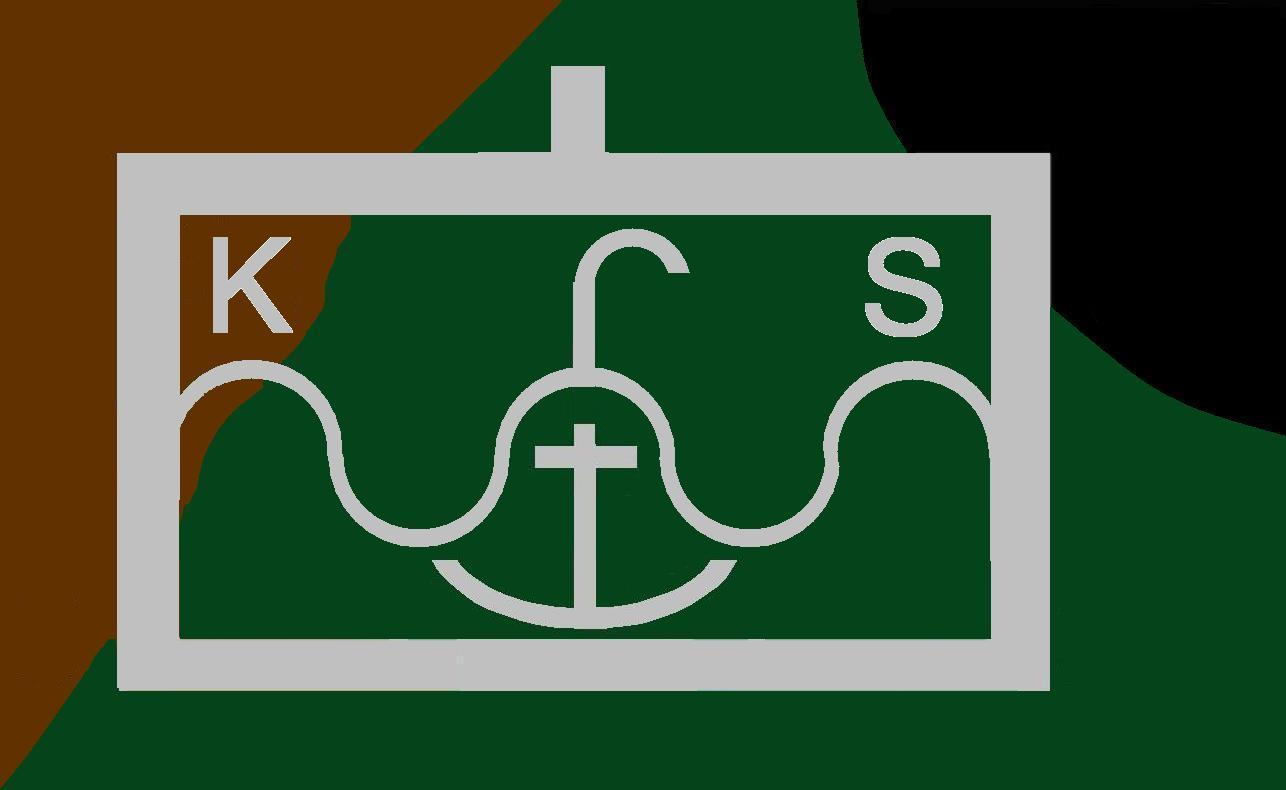 Kampfschwimmerkompanie